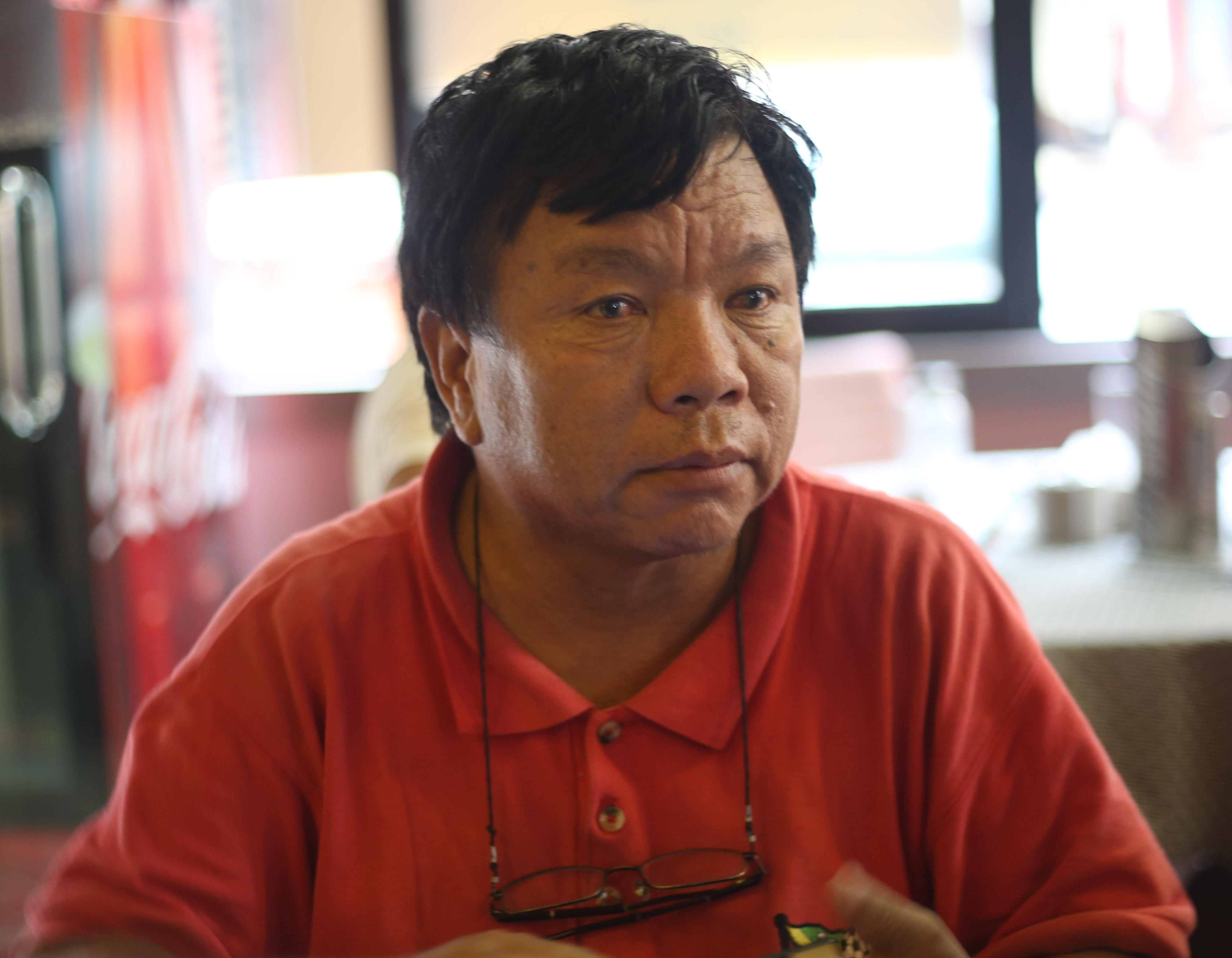 नेपाली: महावीर पुन उनको रेस्टुरेन्टमा